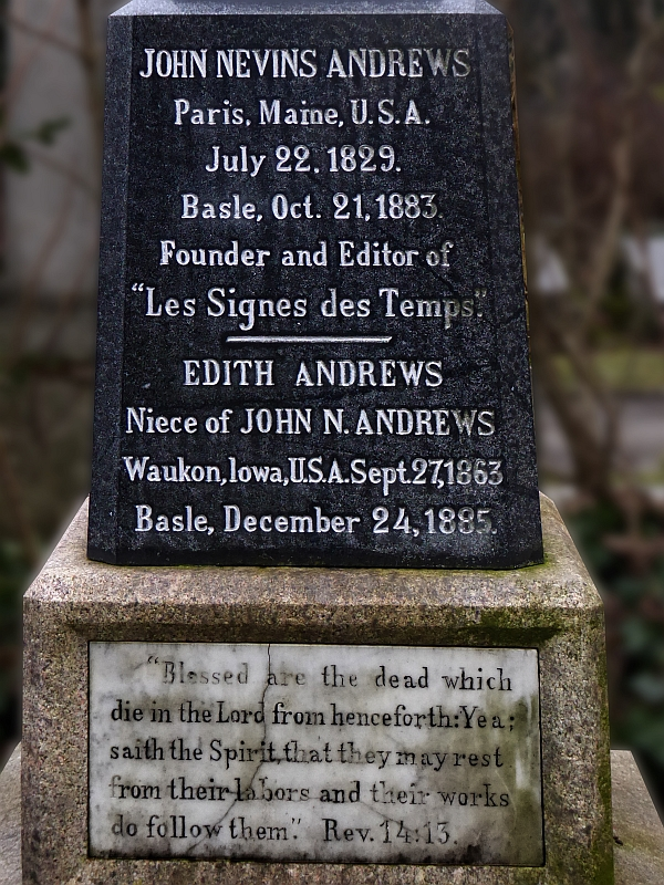 John Nevins Andrews (1829–1883), Prediger, Bibeltheologe, Verfasser von «History of the Sabbath», Missionar der Adventbotschaft in Basel. Nichte Edith Andrews (1863–1885), Grab auf dem Friedhof Wolfgottesacker, Basel